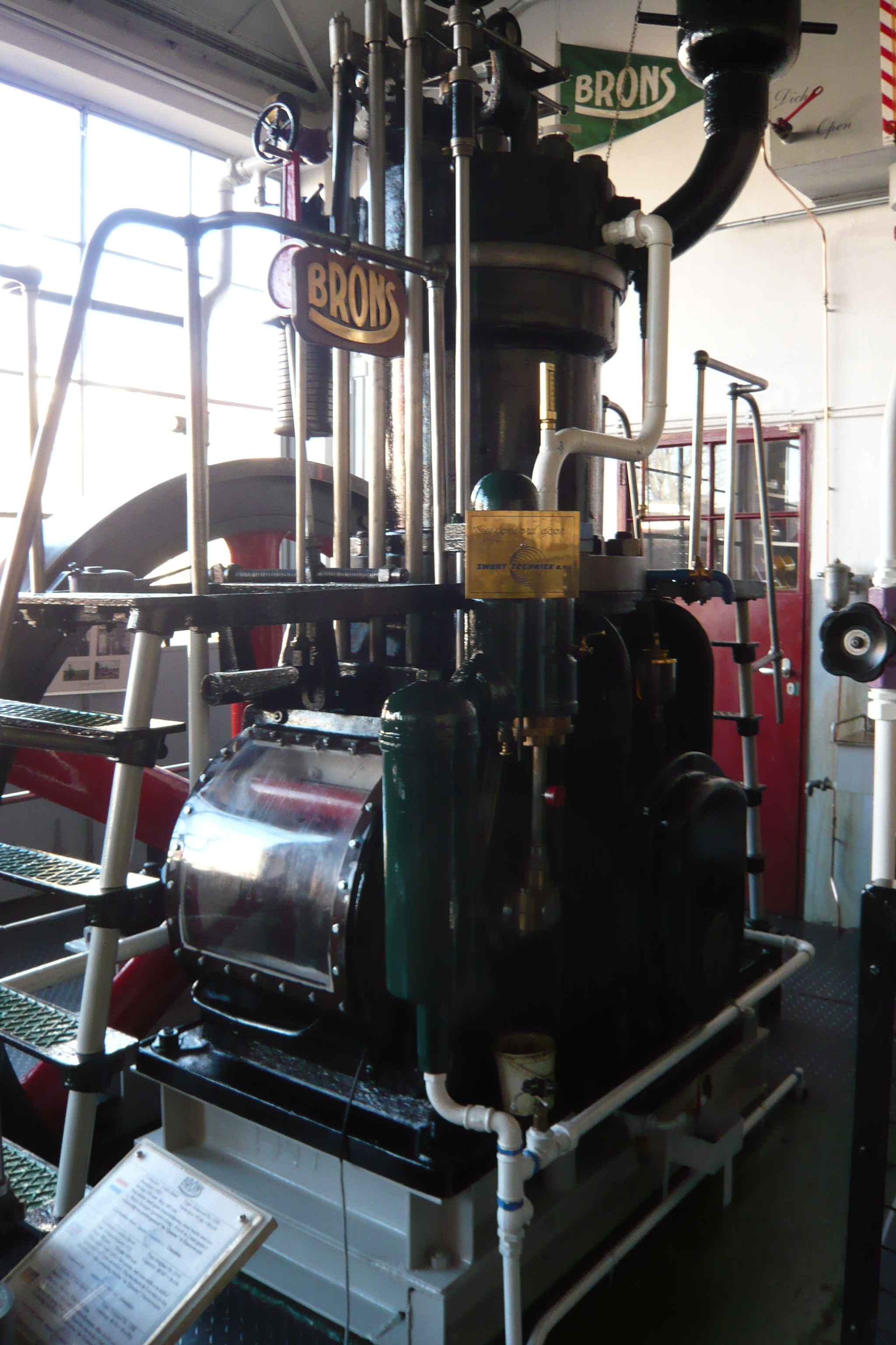 IJmuider Zee- en Havenmuseum 'de Visserijschool', Havenkade 55, IJmuiden Brons motor from De Tjamme pumpstation Finsterwolde - 1 cylinder 4 stroke diesel with spraying cup 1921